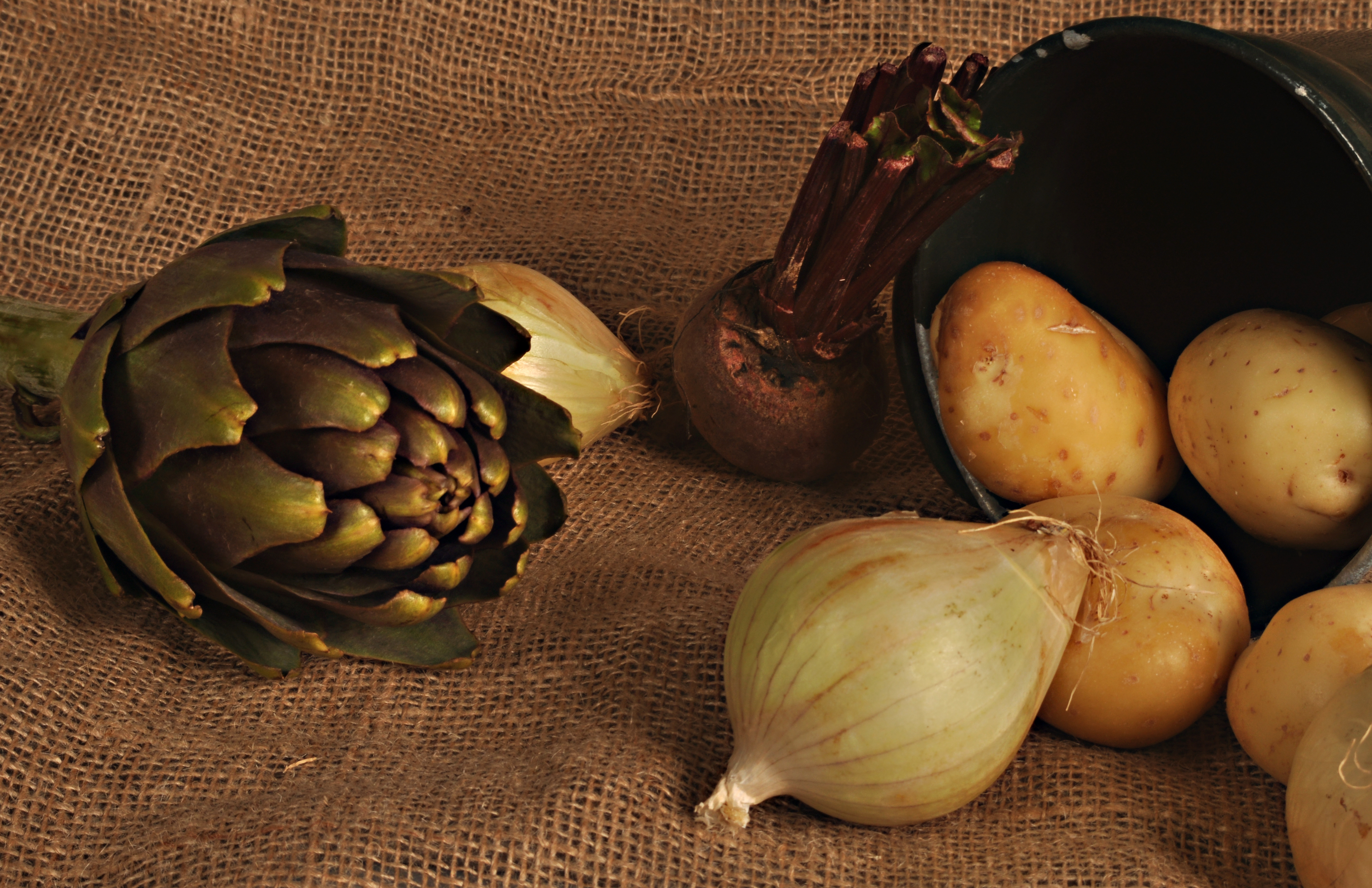 ארטישוק אלון פלורנטין תיכון רוטברג